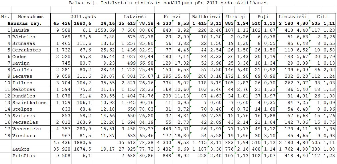 Рузультаты переписи населения Латвии 2011 года